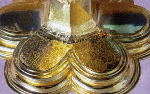 Wappen der Familie Storch auf dem Abendmahlskelch, der 1622 für die damals evangelische Bergkirche Klaus gestiftet wurde. Im Zuge der Gegenreformation mussten die Storchs nach Bayern auswandern, wo sie den Kelch der evangelischen Kirche in Vach bei Fürth spendeten. Noch heute ist dieser Kelch bei den dortigen Abendmahlsfeiern in Verwendung.